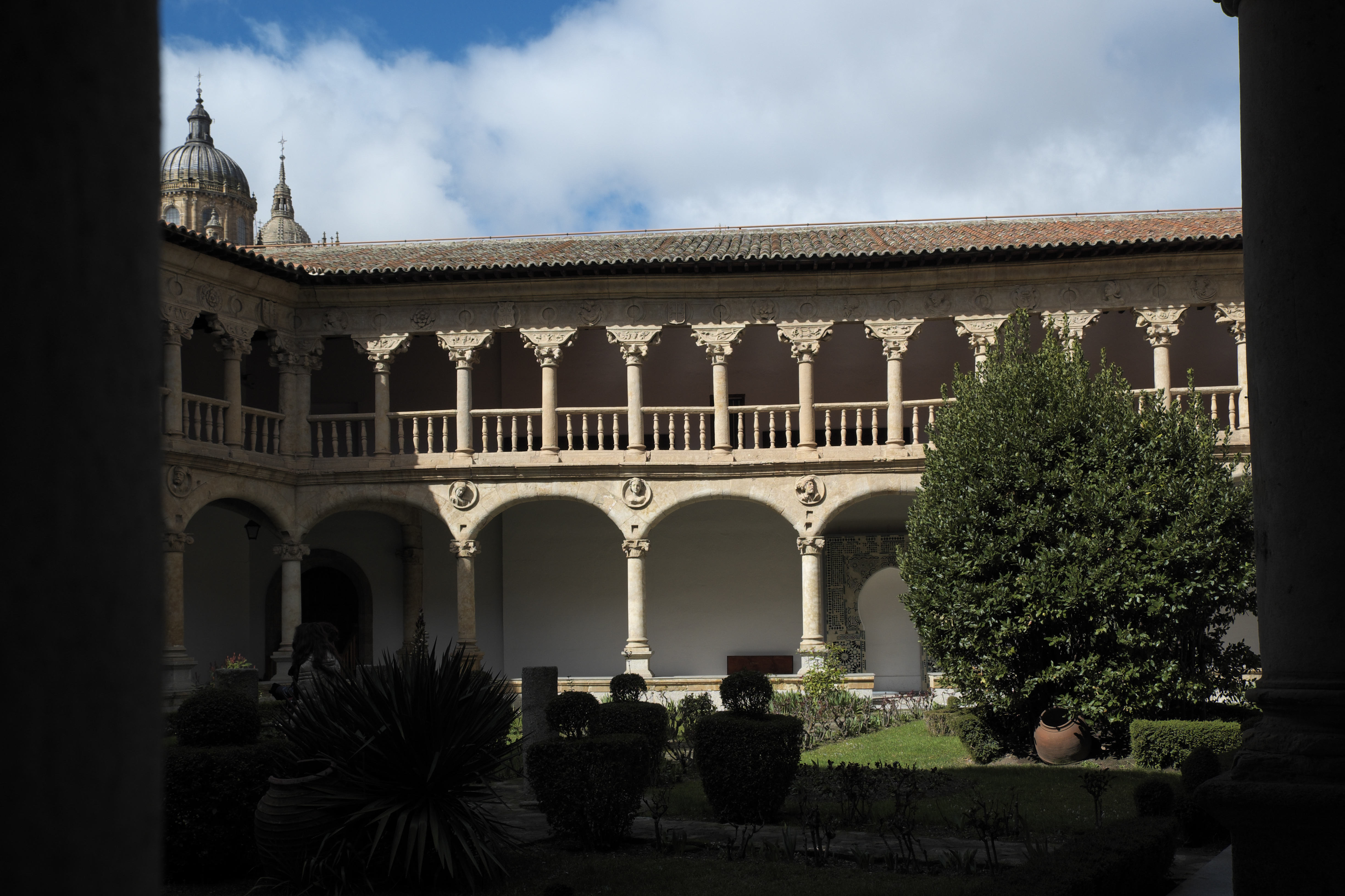 Dominikanerinnenkloster Convento de las Dueñas in Salamanca (Kastilien-León/Spanien)